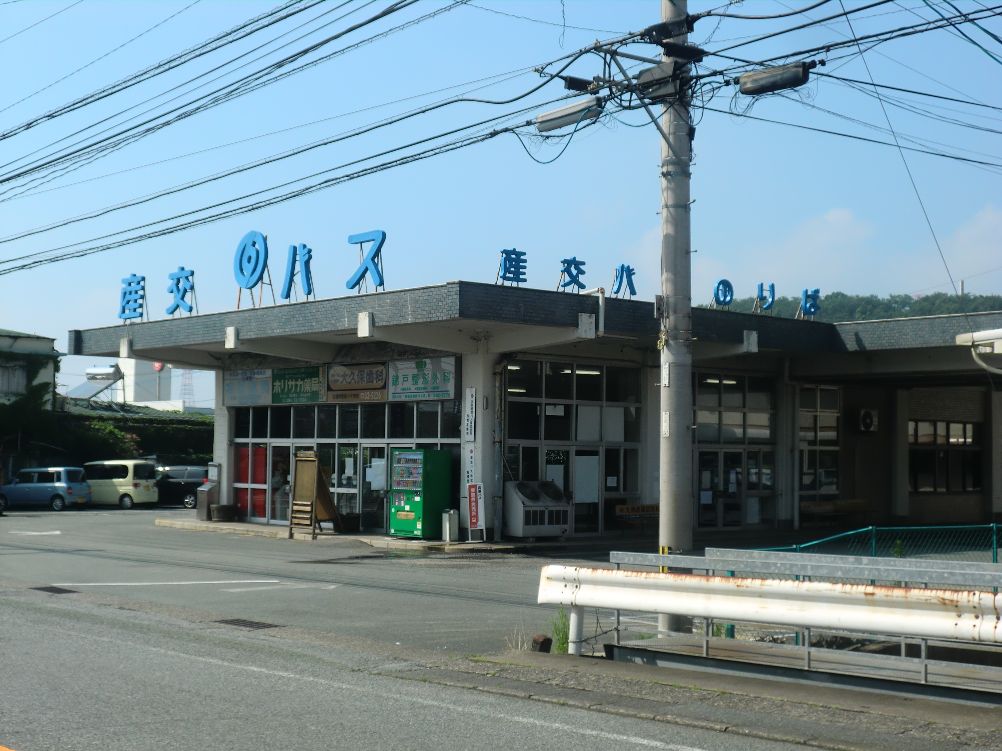 熊本県宇城市にある九州産交バス松橋営業所（敷地外から撮影）